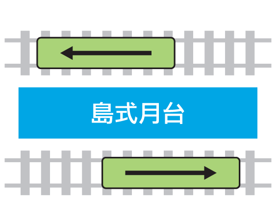 島式月台示意圖